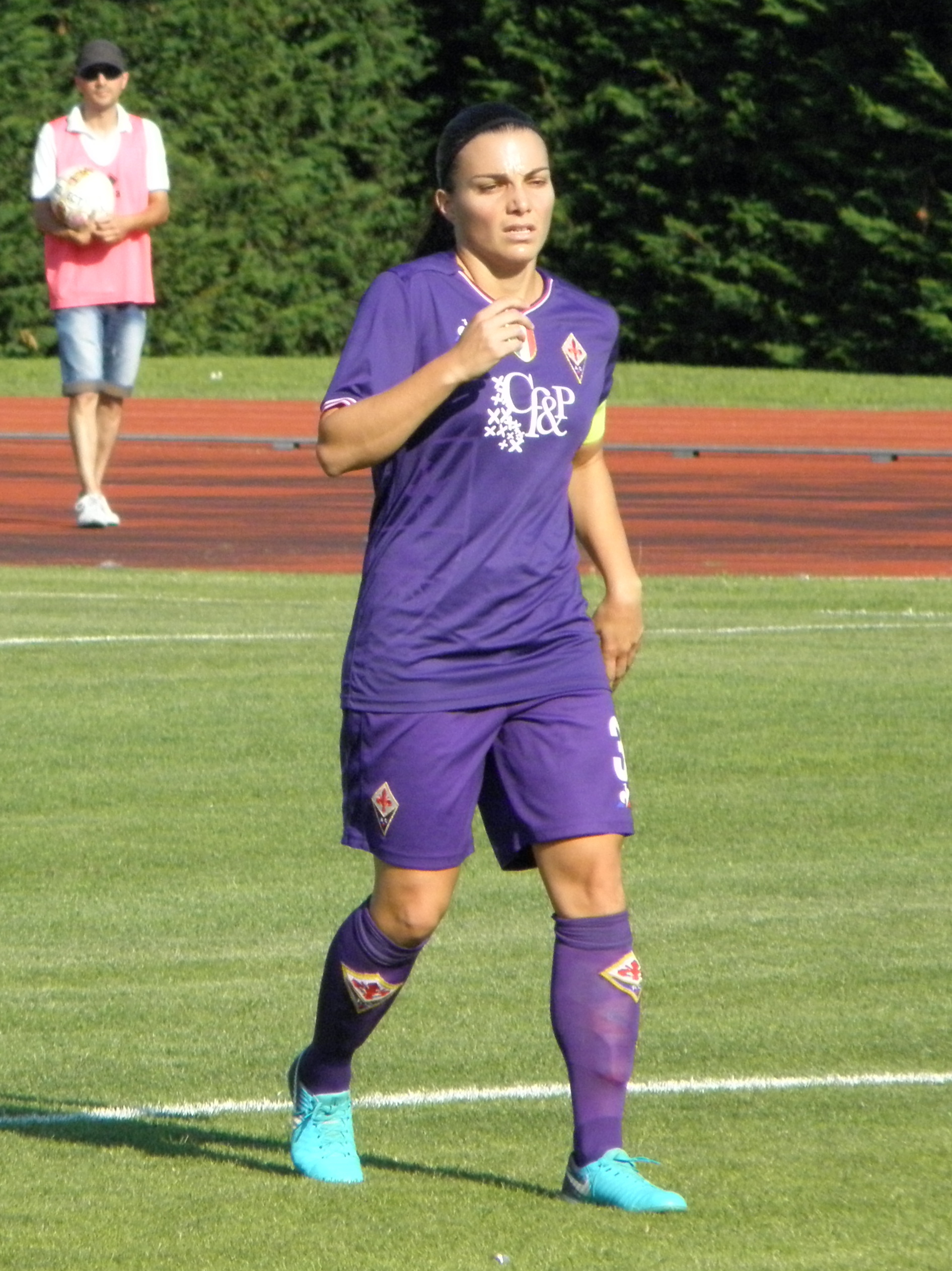 Abano Terme, Stadio delle Terme: 16 giugno 2018, spareggio UEFA Women's Champions League. Alia Guagni durante una fase di gioco.